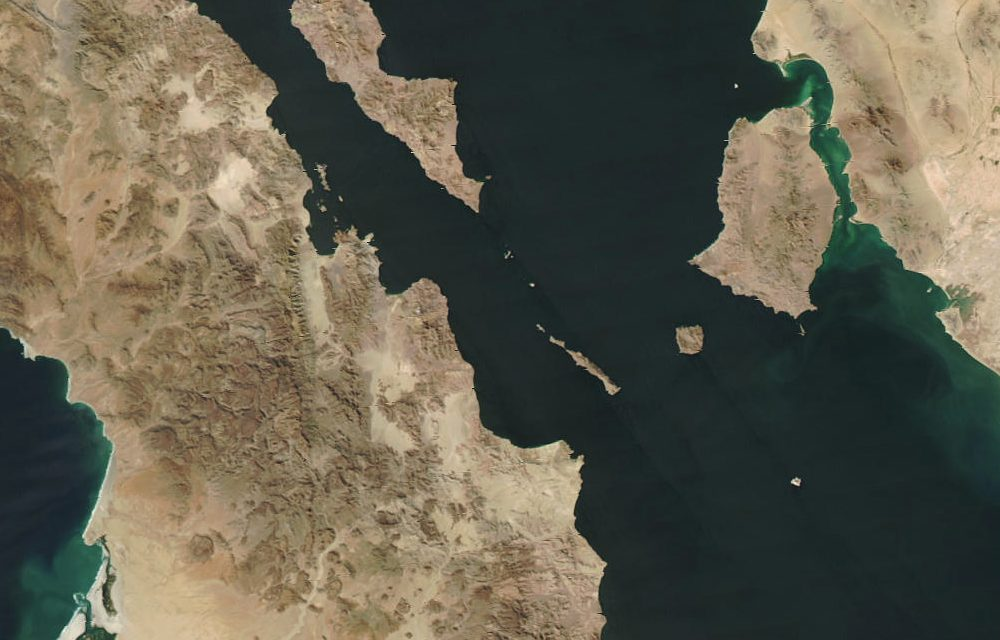 Isla Tiburón y Ángel de la Guarda